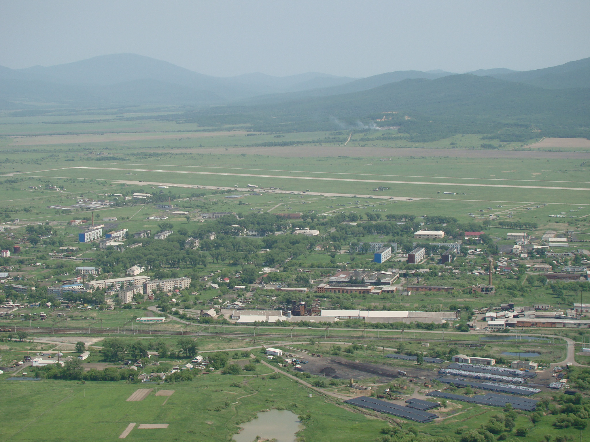 черниговка